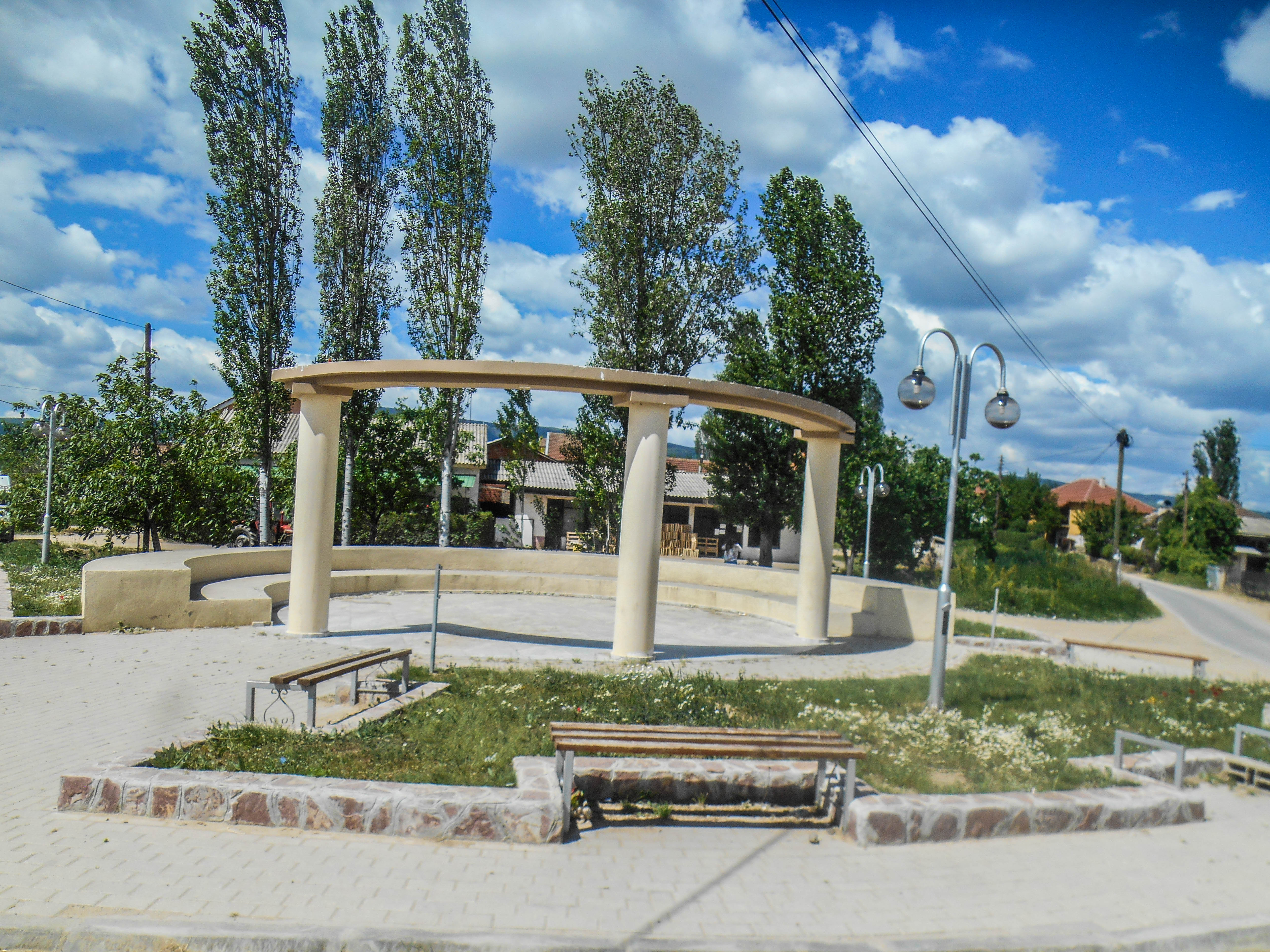 Градошорци